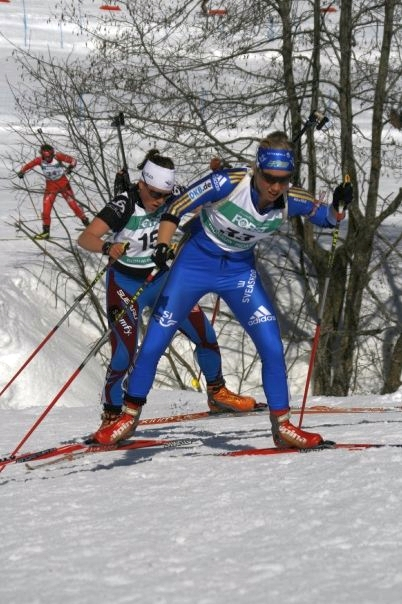 See Title